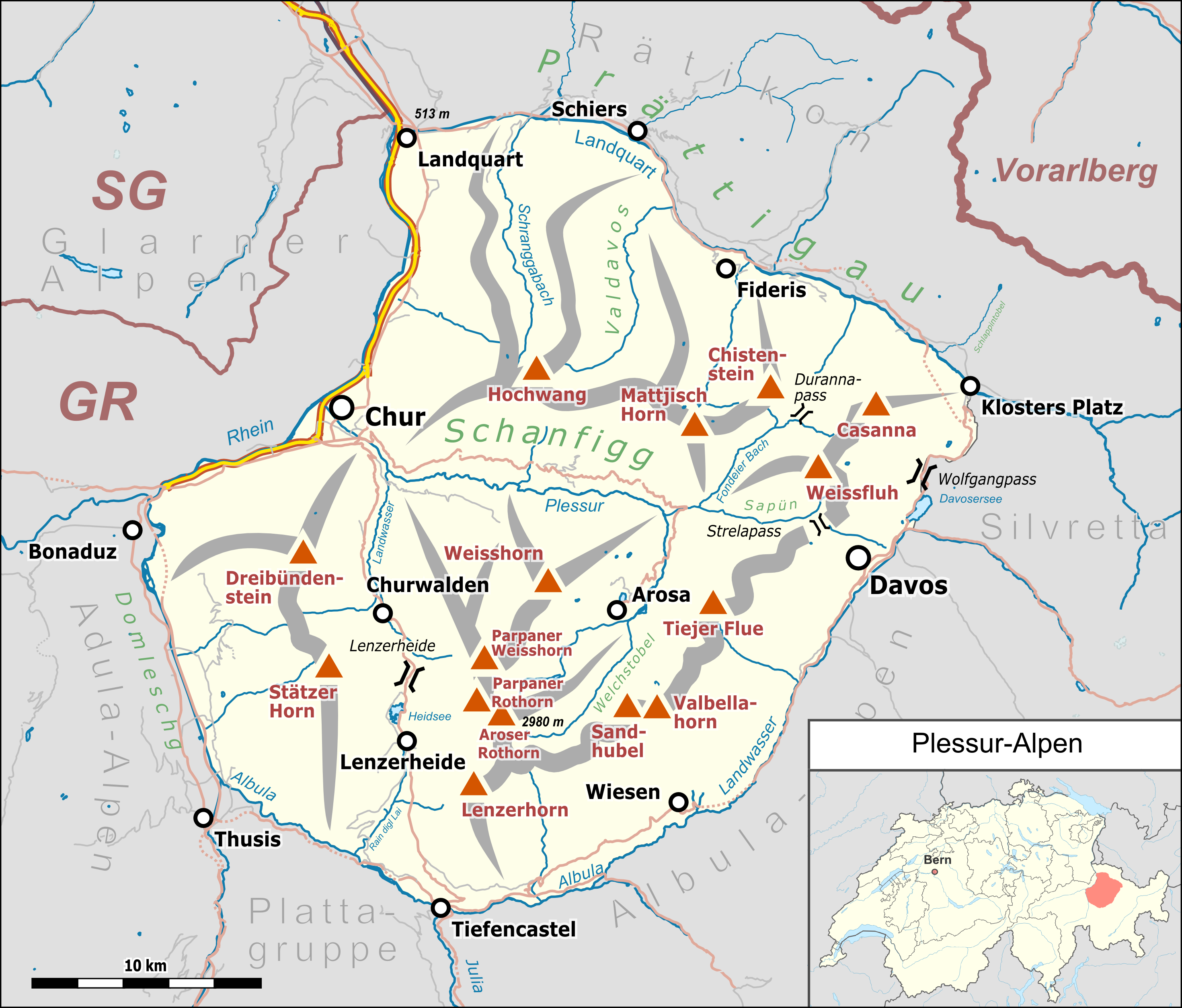 Lagekarte der Plessur-Alpen